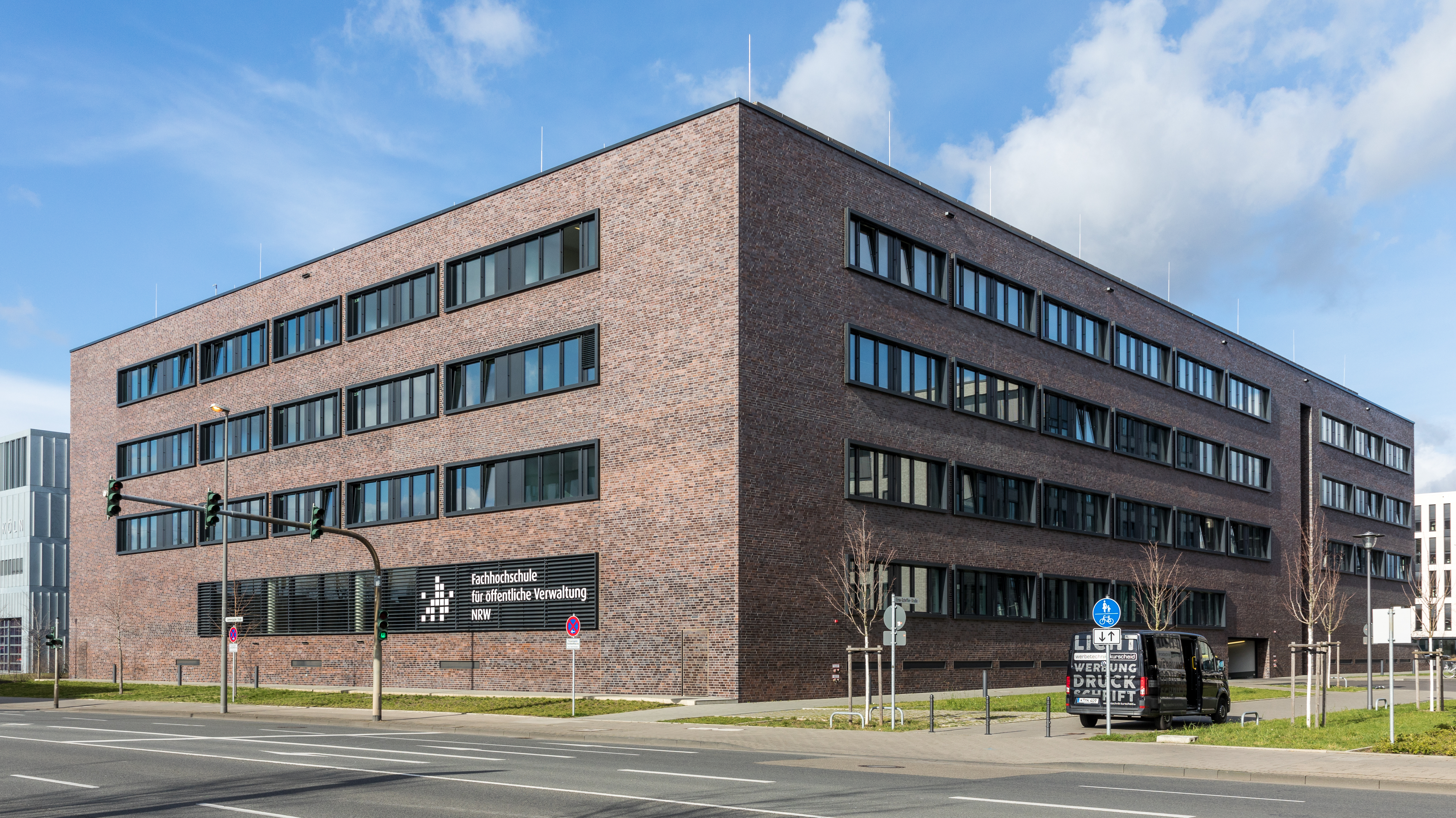 Fachhochschule für öffentliche Verwaltung Nordrhein-Westfalen, Erna-Scheffler-Straße 4, 51103 Köln. Fertigstellung/Erstbezug: Januar 2017. Seit Januar 2020: Hochschule für Polizei und öffentliche Verwaltung Nordrhein-Westfalen